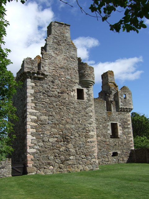 Glenbuchat Castle in Aberdeenshire, Scotland